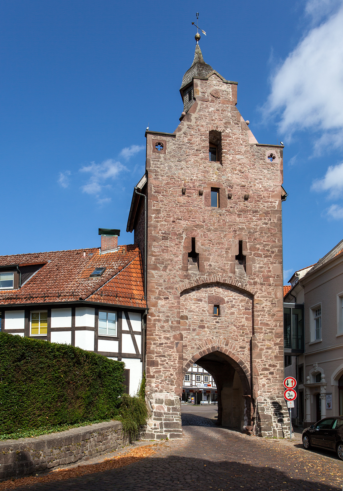 Blomberg (Kreis Lippe), "Das Niedere Tor", Langer SteinwegThis is a photograph of an architectural monument.